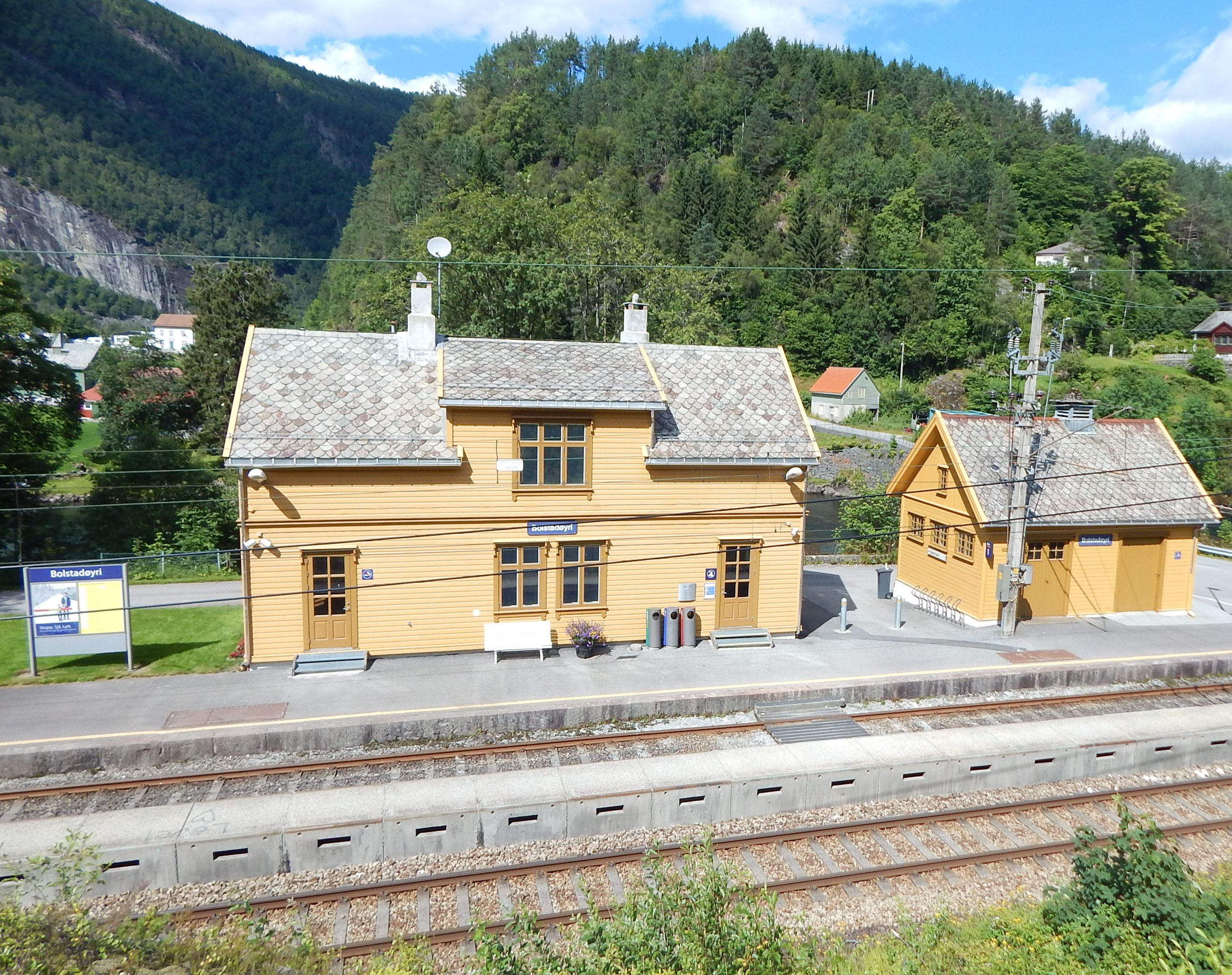 Bolstadøyri stasjon